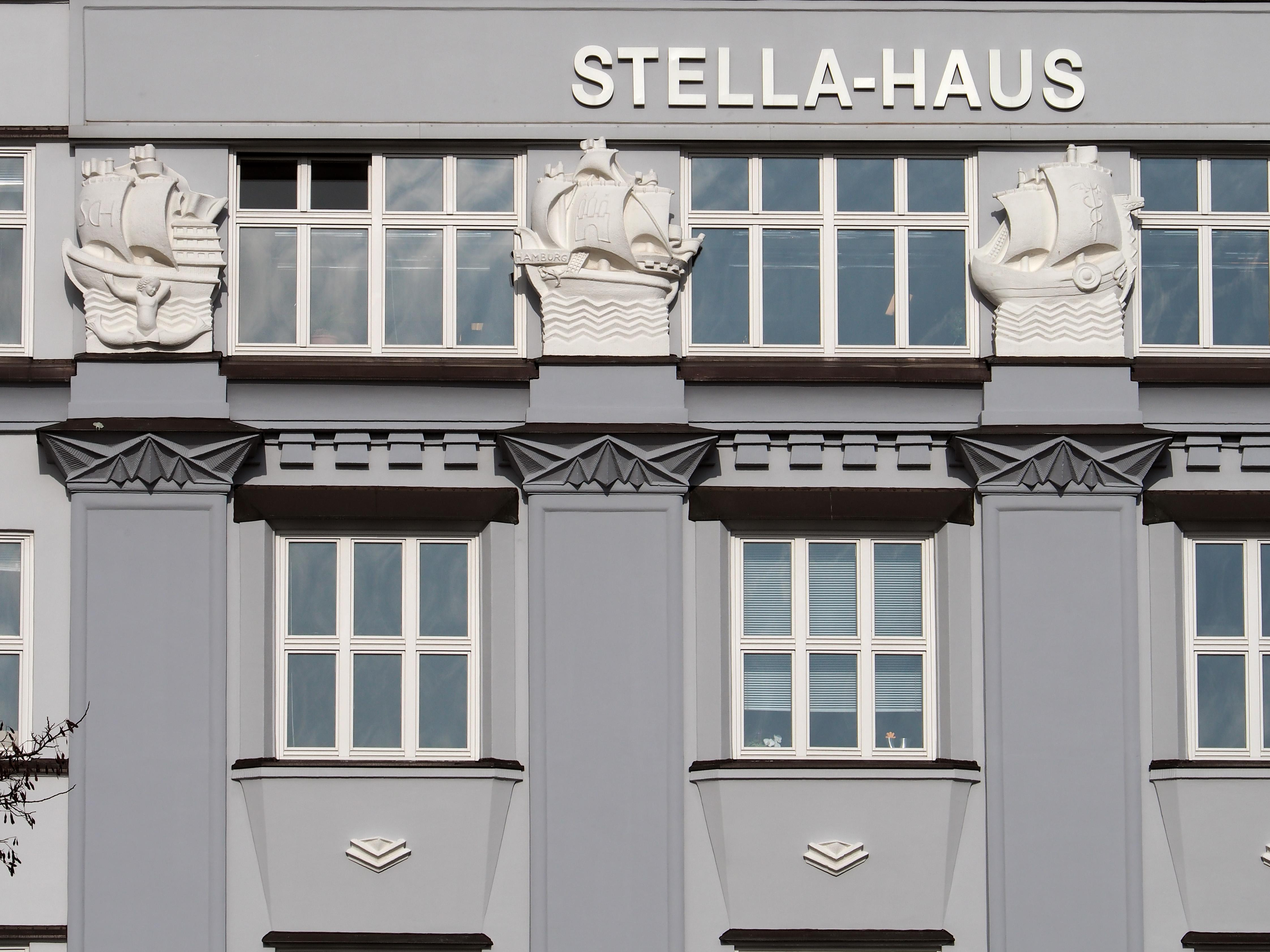 Hamburg, Kontorhaus Stella-Haus, Detail, Februar 2015